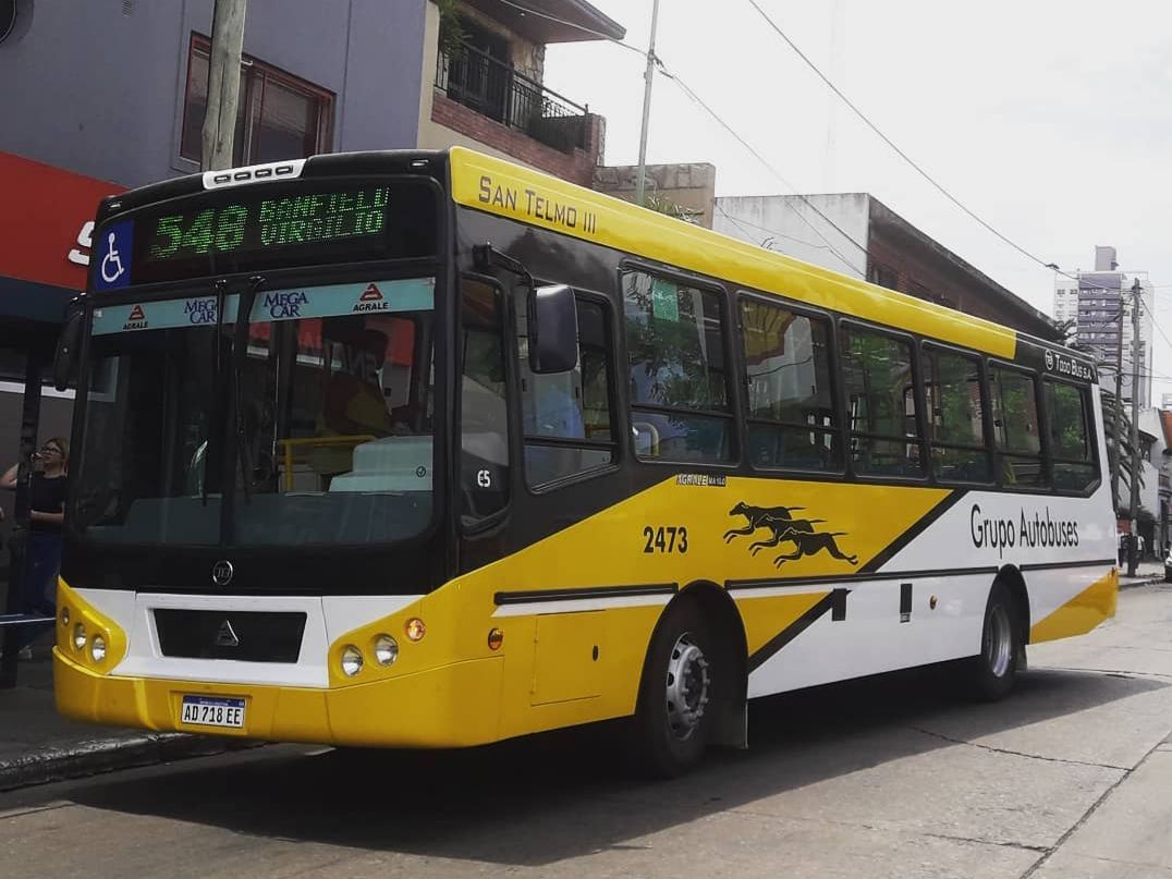 Línea 548